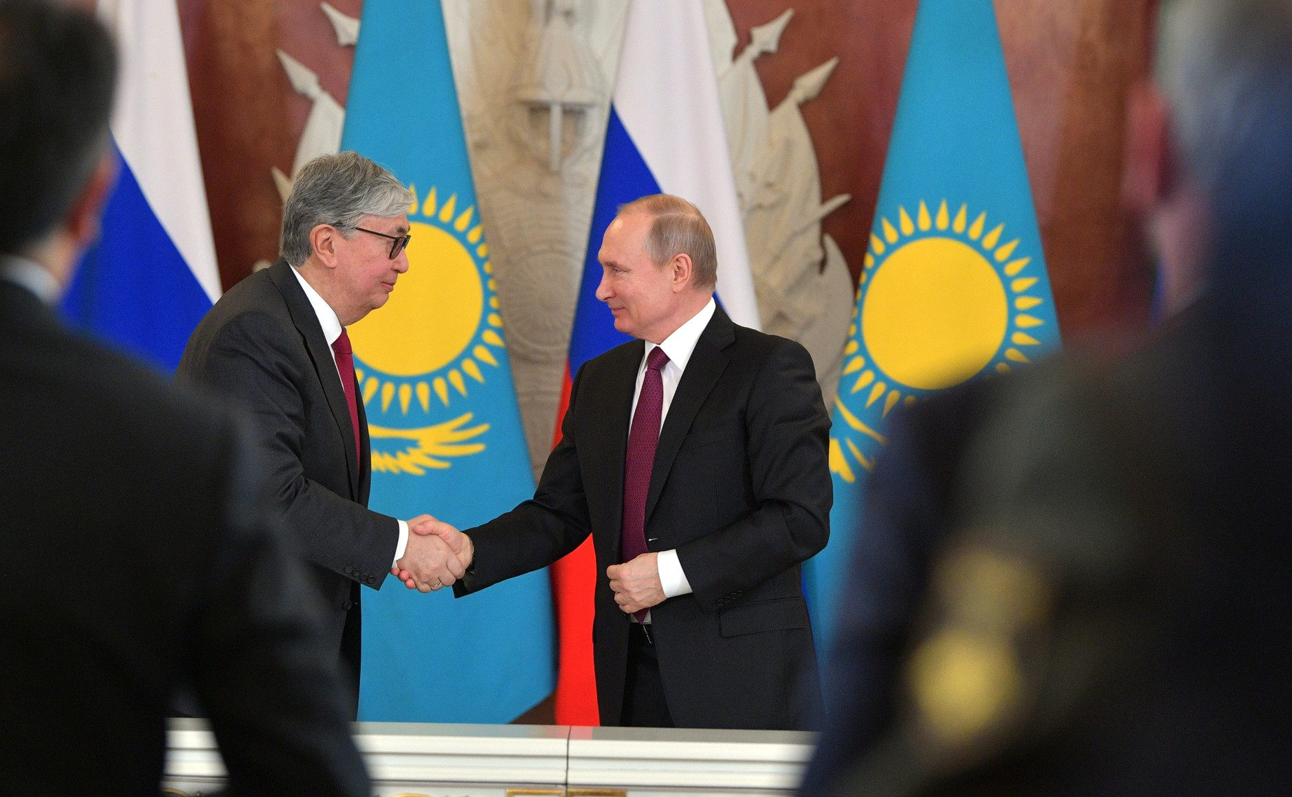 Президент Российской Федерации Владимир Путин с Президентом Республики Казахстан Касым-Жомартом Токаевым по окончании российско-казахстанских переговоров